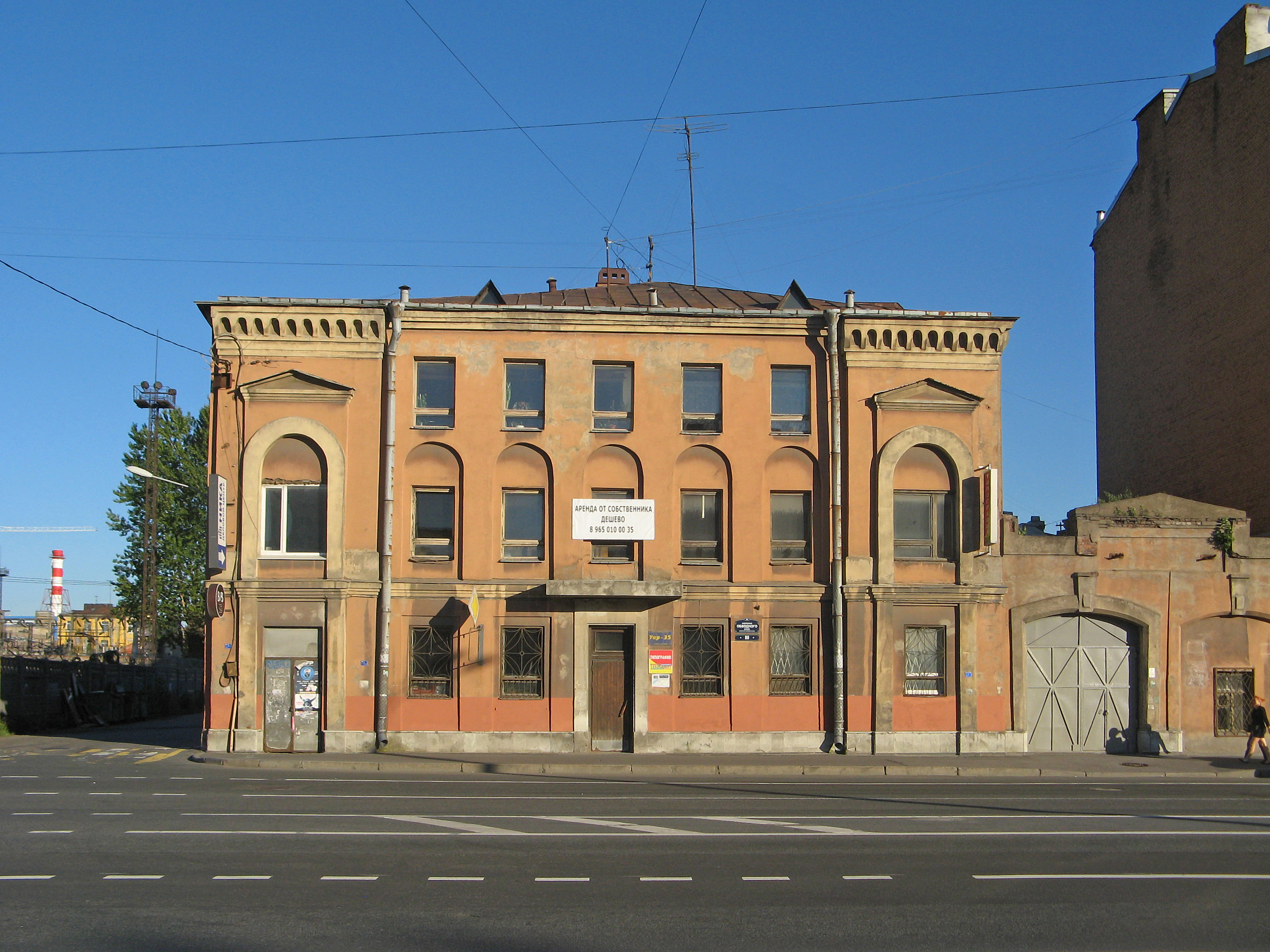 Дом № 80 на набережной Обводного канала, Санкт-Петербург